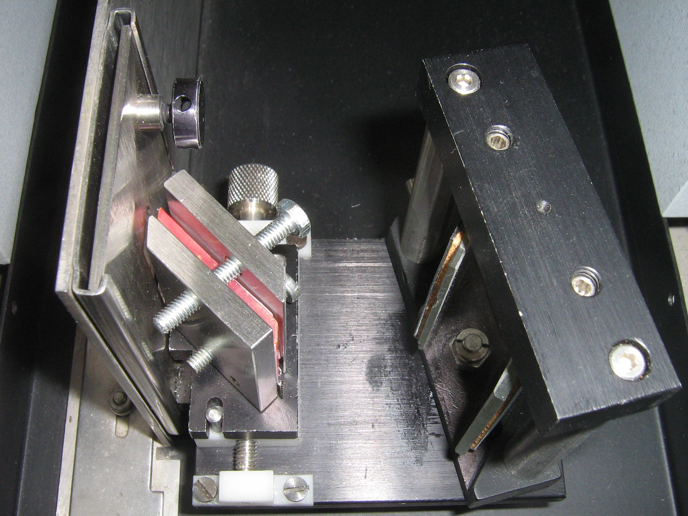 ATR-Messeinrichtung für die Infrarotspektroskopie